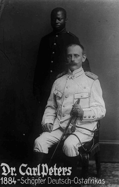 Dr. Carl Peters 1884, "Schöpfer Deutsch Ost-Afrikas".